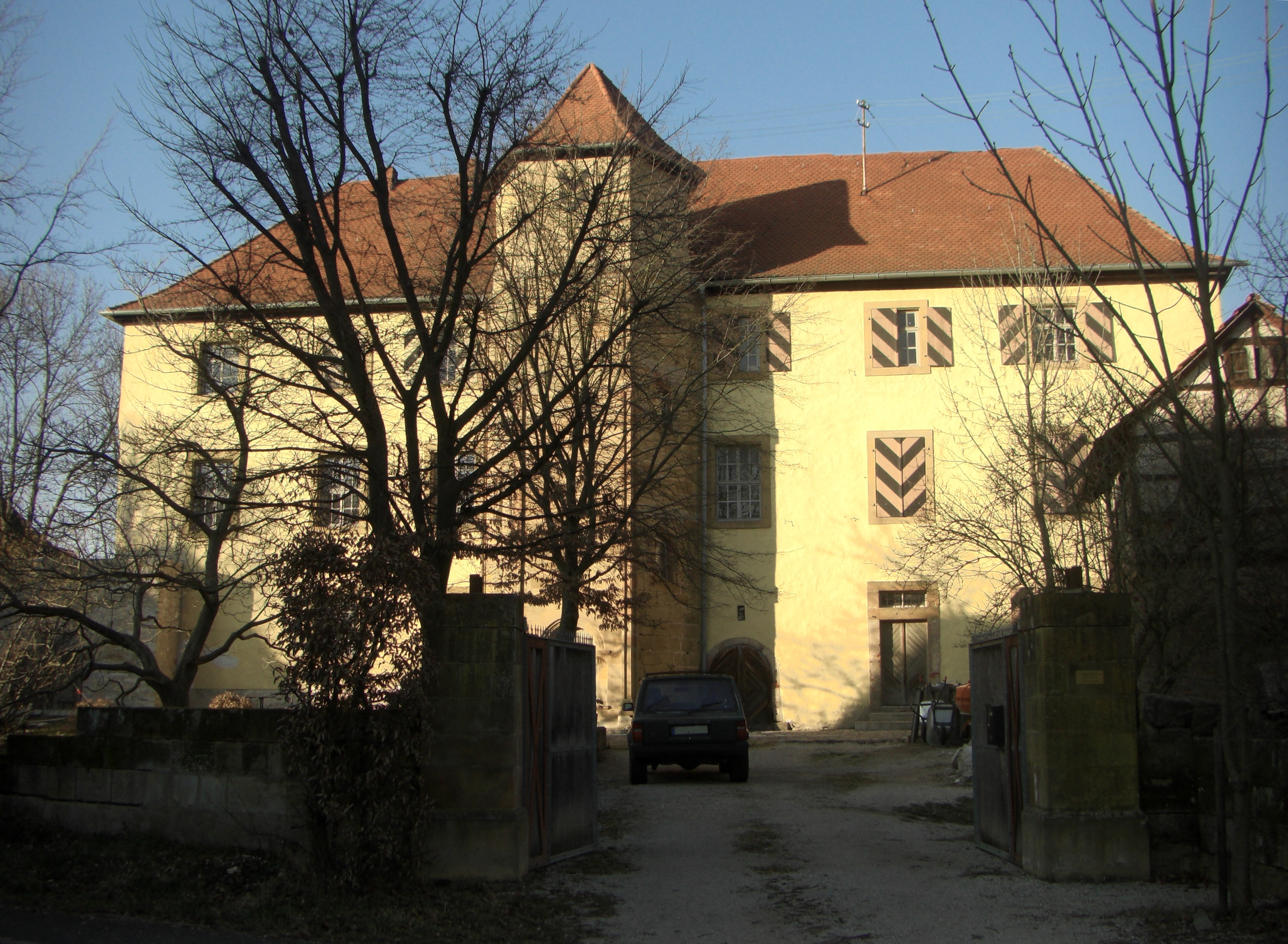 Rittergut / Schloss Ermreuth von Süden, Marktplatz 14, Neunkirchen am Brand, Oberfranken, Bayern, DeutschlandDreigeschossiger Walmdachbauim 16. Jahrhundert von den Muffel erbaut - Vorgängerbauten wurden bereits vor 1358 erwähnt und waren seit 1400 im Besitz der Muffel1573/1579-1622 im Besitz der Stiebar1622-1632 im Besitz der Wildenstein1633-1858 im Besitz der Künsberg1858-? Andreas Schäffab 1926 richtete der nationalsozialistische Wanderverein Ermreuth e. V. ein Ludendorff-Heim einab 1935 nutzte die NSDAP das Scxhloss als KreisführerschuleEinige Jahrzehnte später diente es der Wehrsportgruppe Hoffmann als UnterkunftHeute gehört es Hoffmanns Fiduz. Kulturstiftung Rittergut-Schloss Sahlis - Sachsen